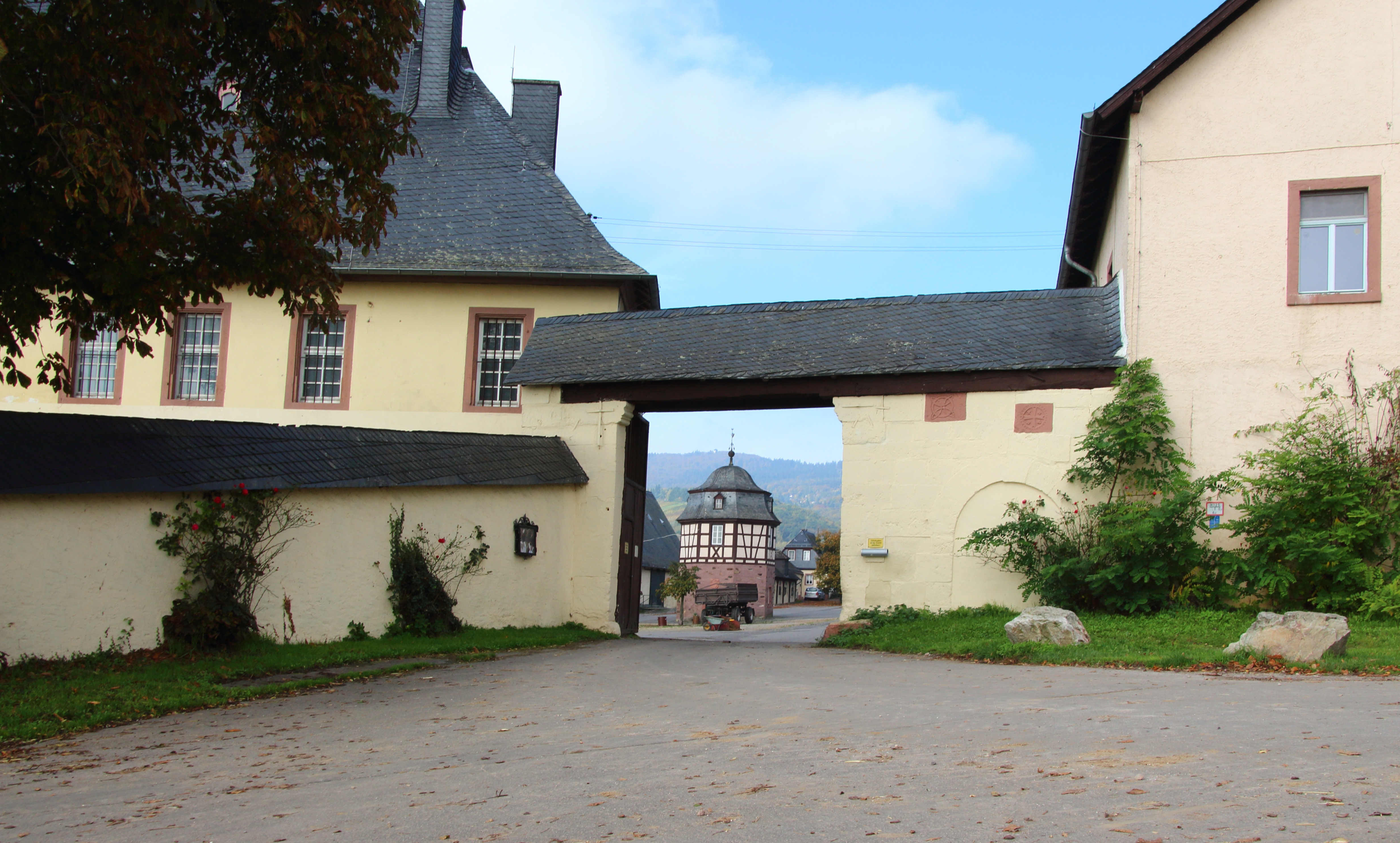 Domäne Neuhof, Grangie des Klosters Eberbach, gegründet zwischen 1163 und 1178. Südliches Haupttor, in der Mitte das Brunnen- und Taubenhaus. Hattenheim im Rheingau.